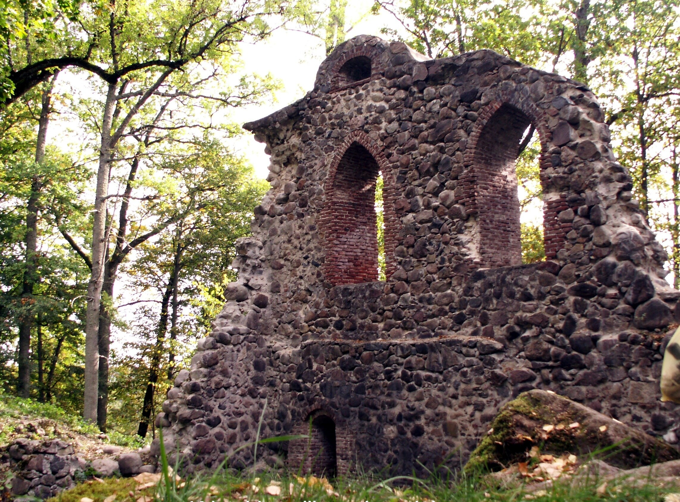 Krimulda – gyvenvietė Latvijoje, Vidžemėje, dešiniajame Gaujos upės krante, 55 km nuo Rygos, Gaujos nacionaliniame parke.